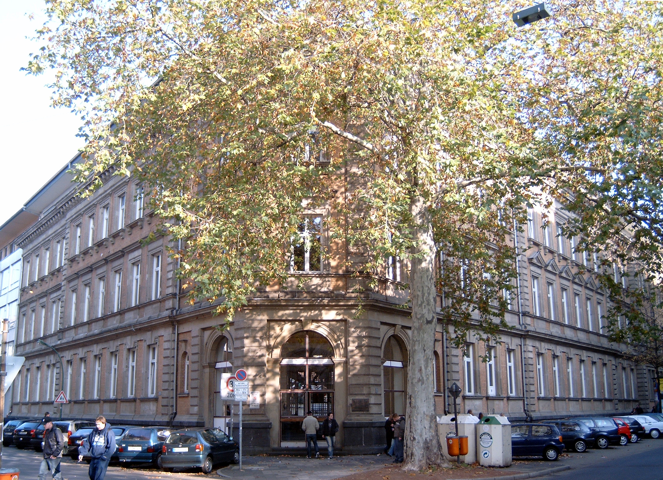 Albrecht-Dürer-Schule, frühere Oberrealschule am Fürstenwall